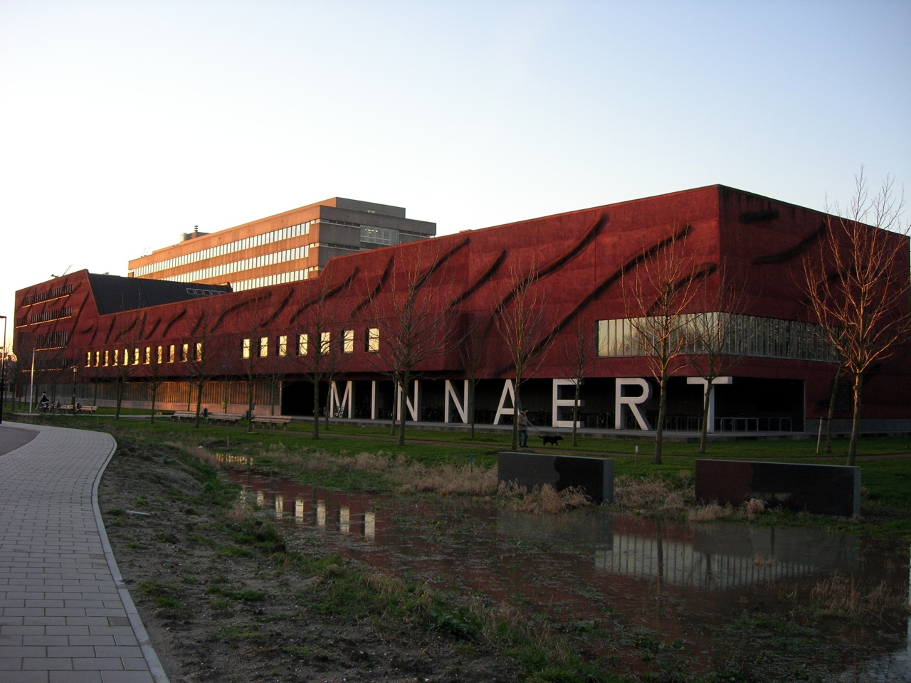 Het Minnaertgebouw op de Uithof (Utrecht)